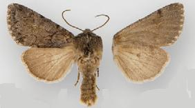 Lasionycta skraelingia male